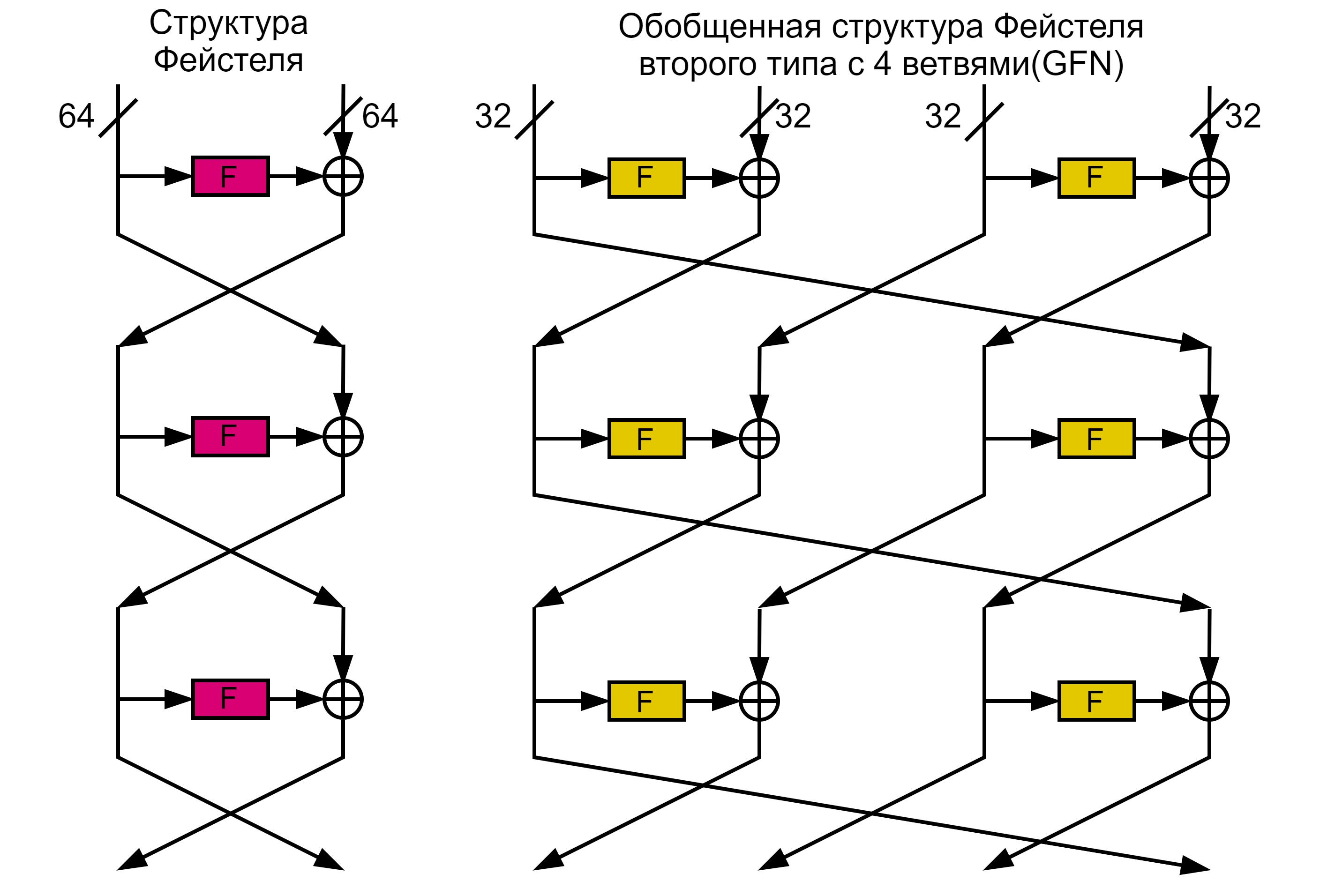 Сравнение обобщенной структуры Фейстеля второго типа и обычной структуры Фейстеля в алгоритме CLEFIA